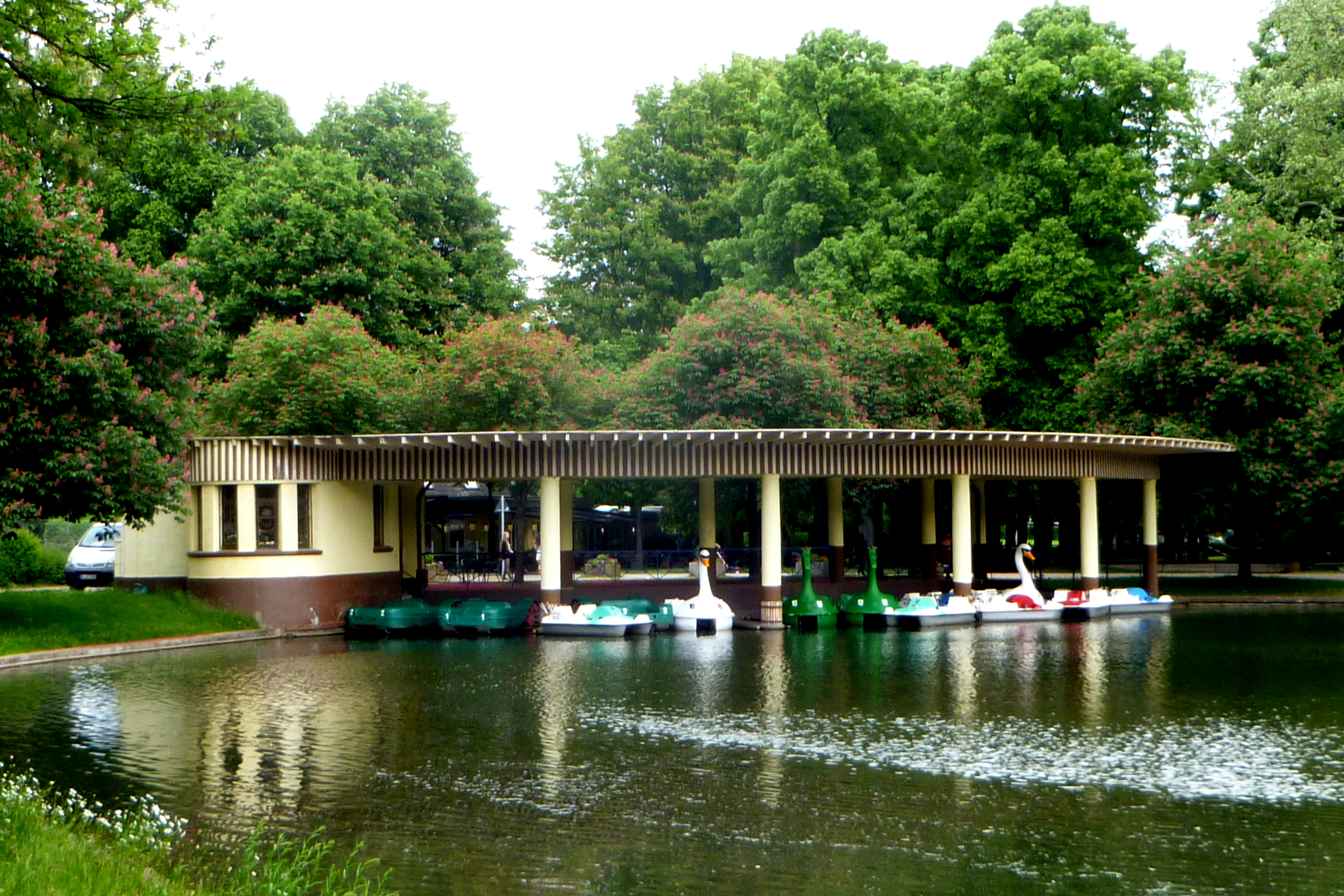 Bootshaus Hangeweiher Aachen